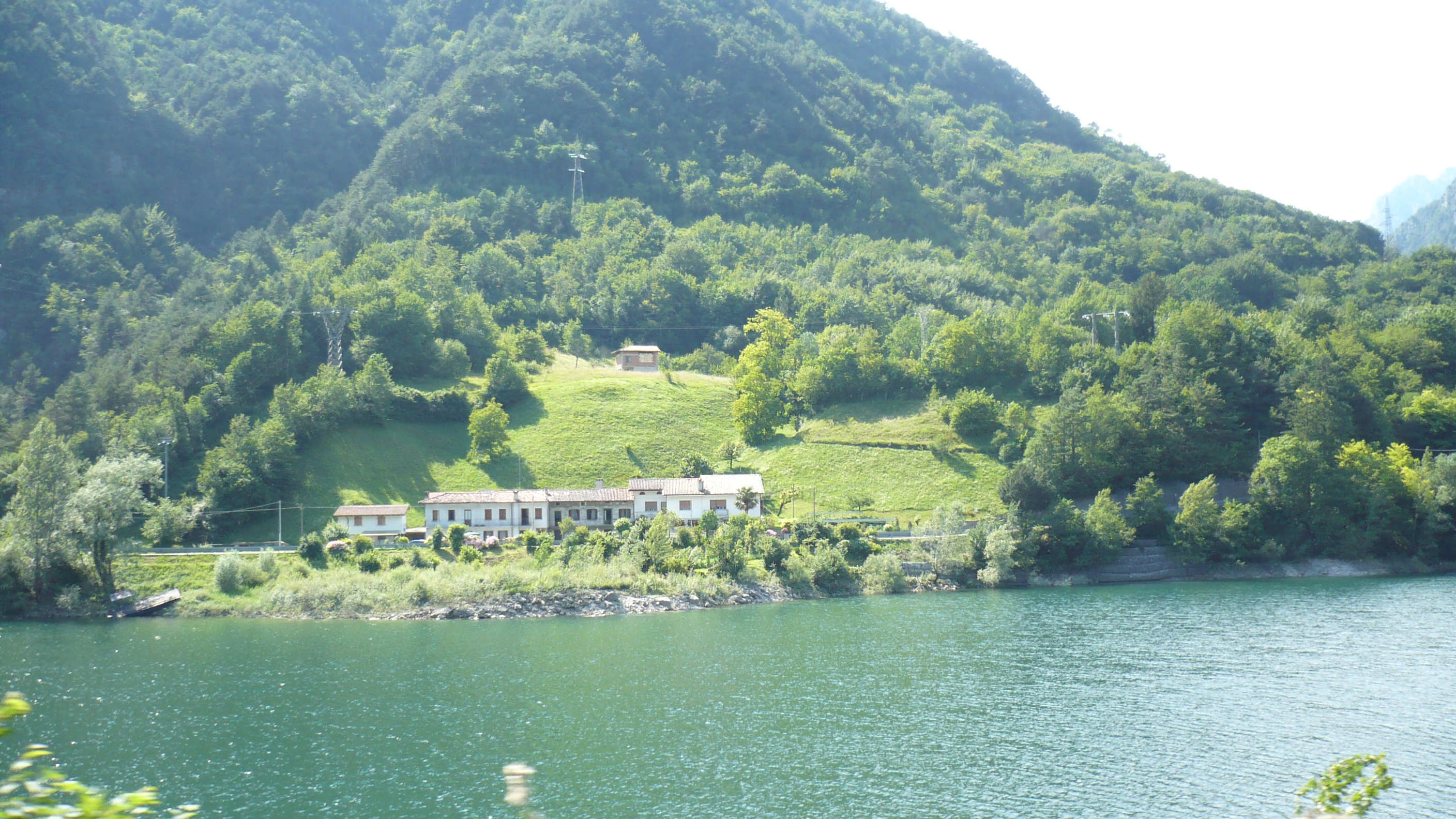 lago di tramonti